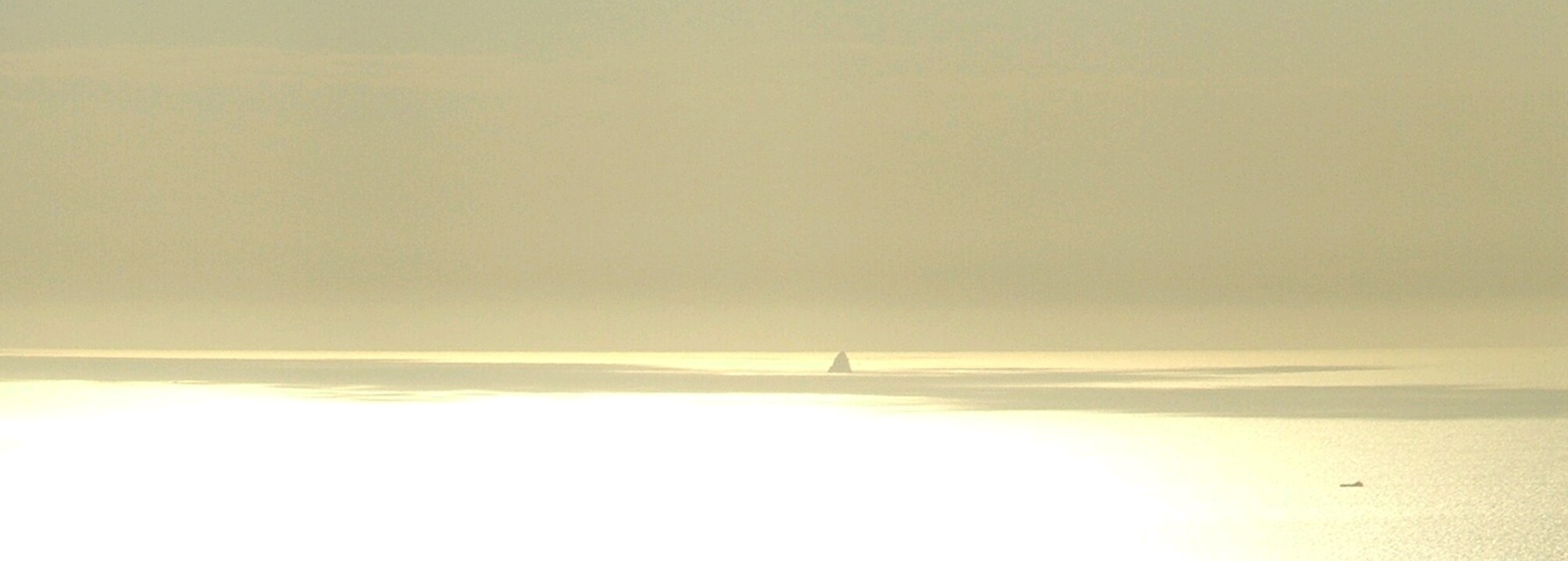 Jabuka island